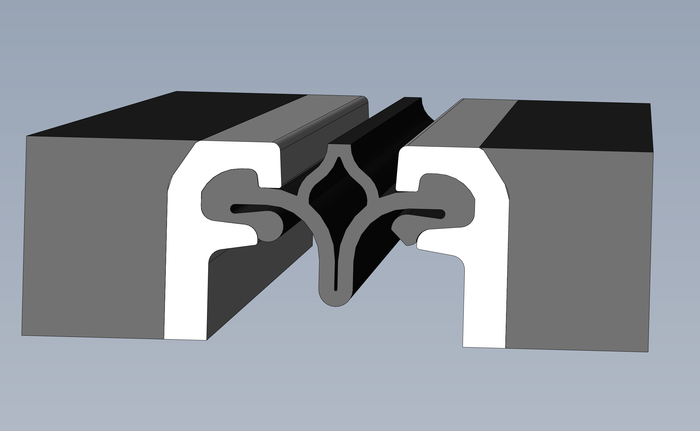 schematischer Querschnitt einer Maurer+Söhne-Dehnfuge